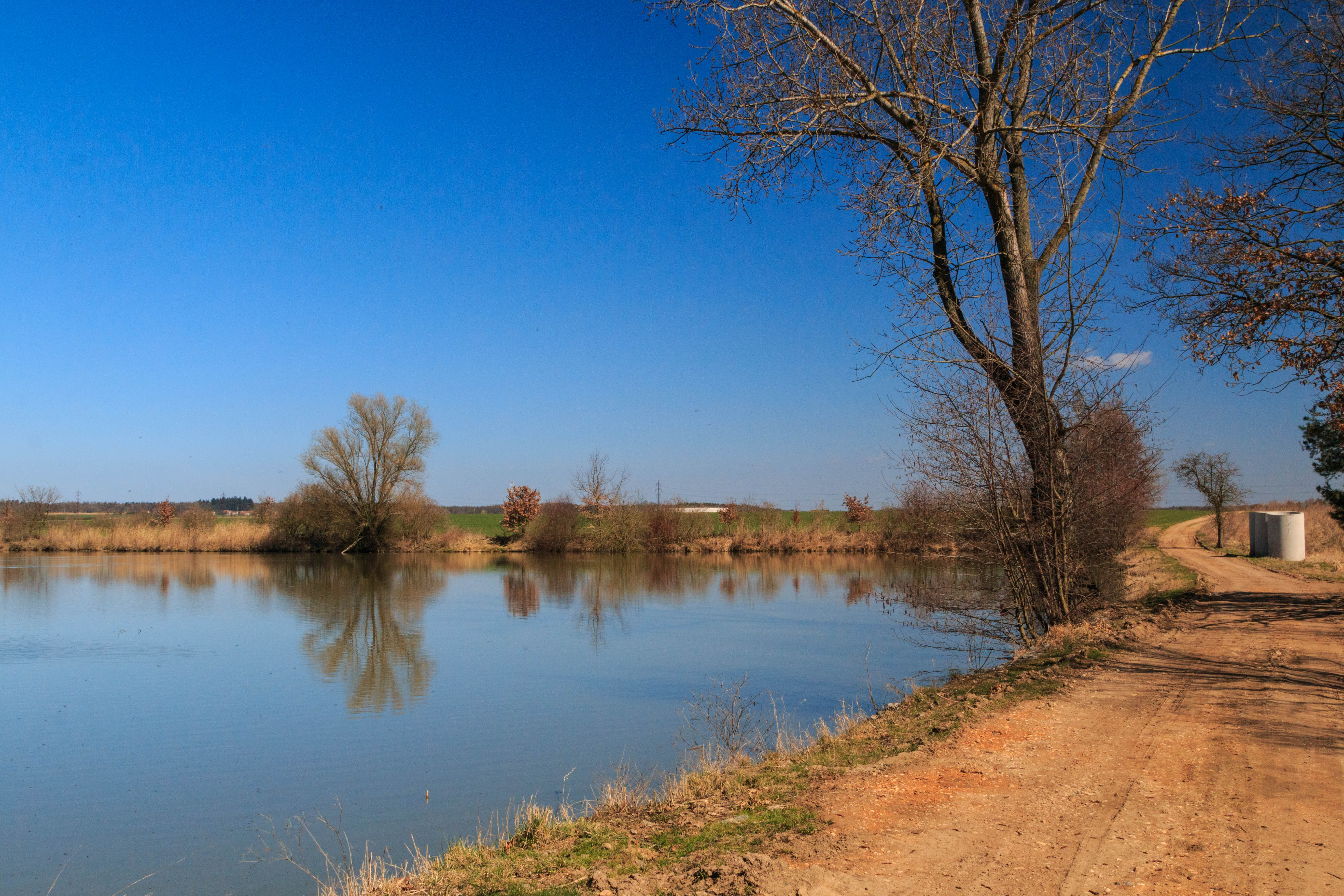 Kosický rybník Project: Vodstvo.